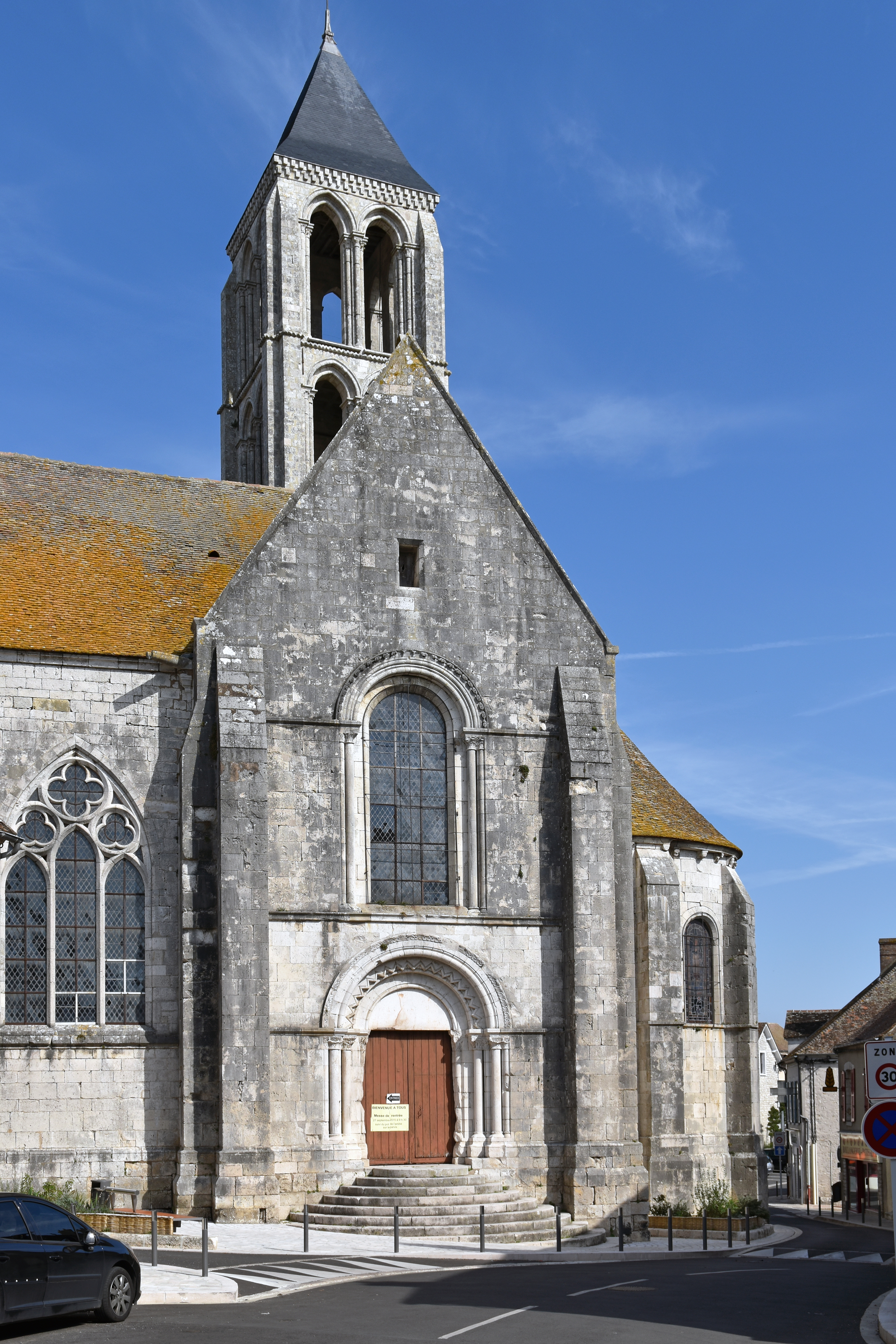 Église Notre-Dame de l'Assomption de Château-Landon, Seine et Marne, France .